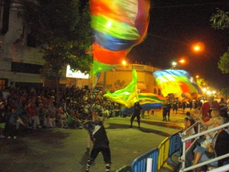 Banderas de comparsas montevideanas